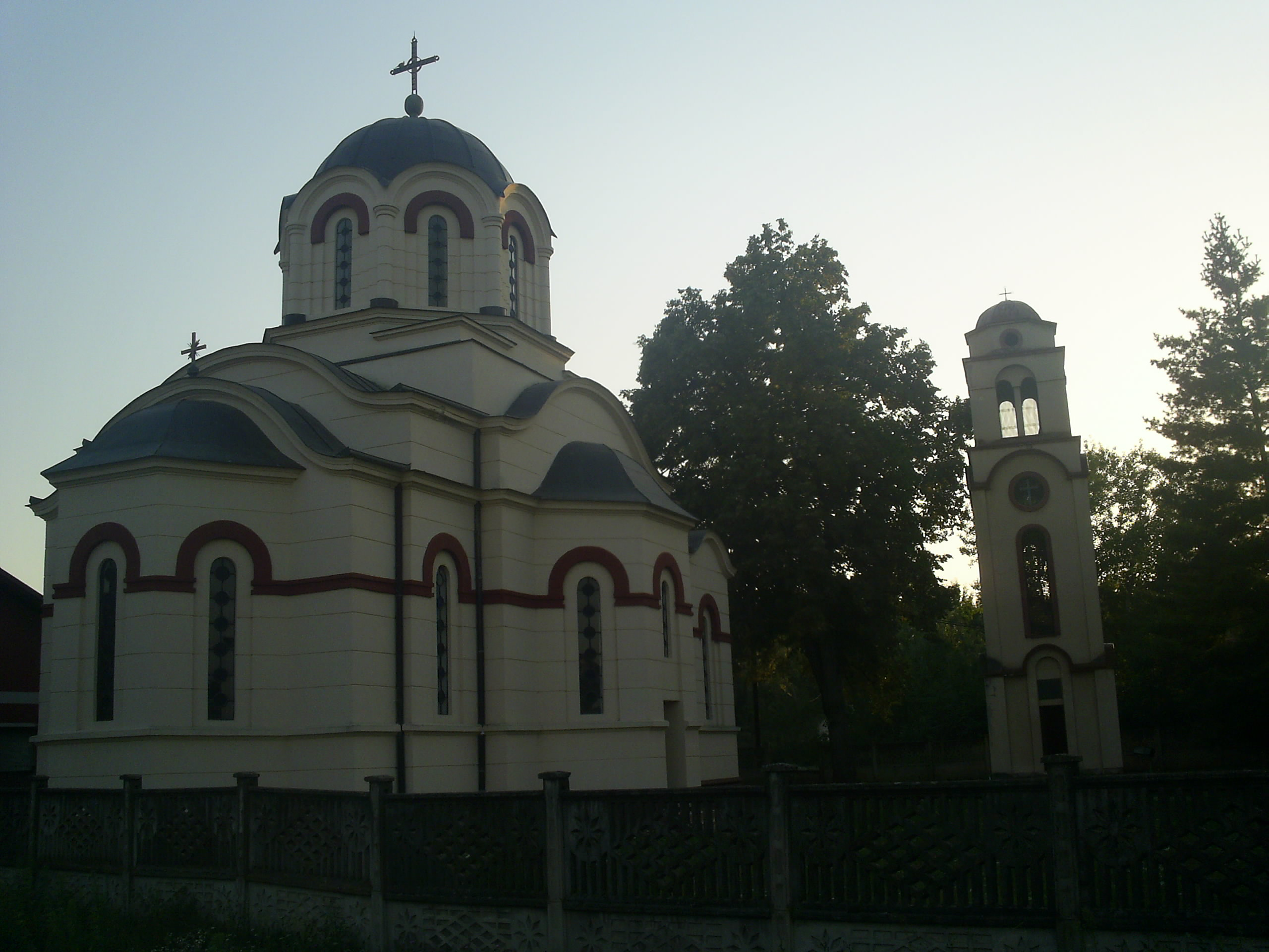 Црква у Кијеву